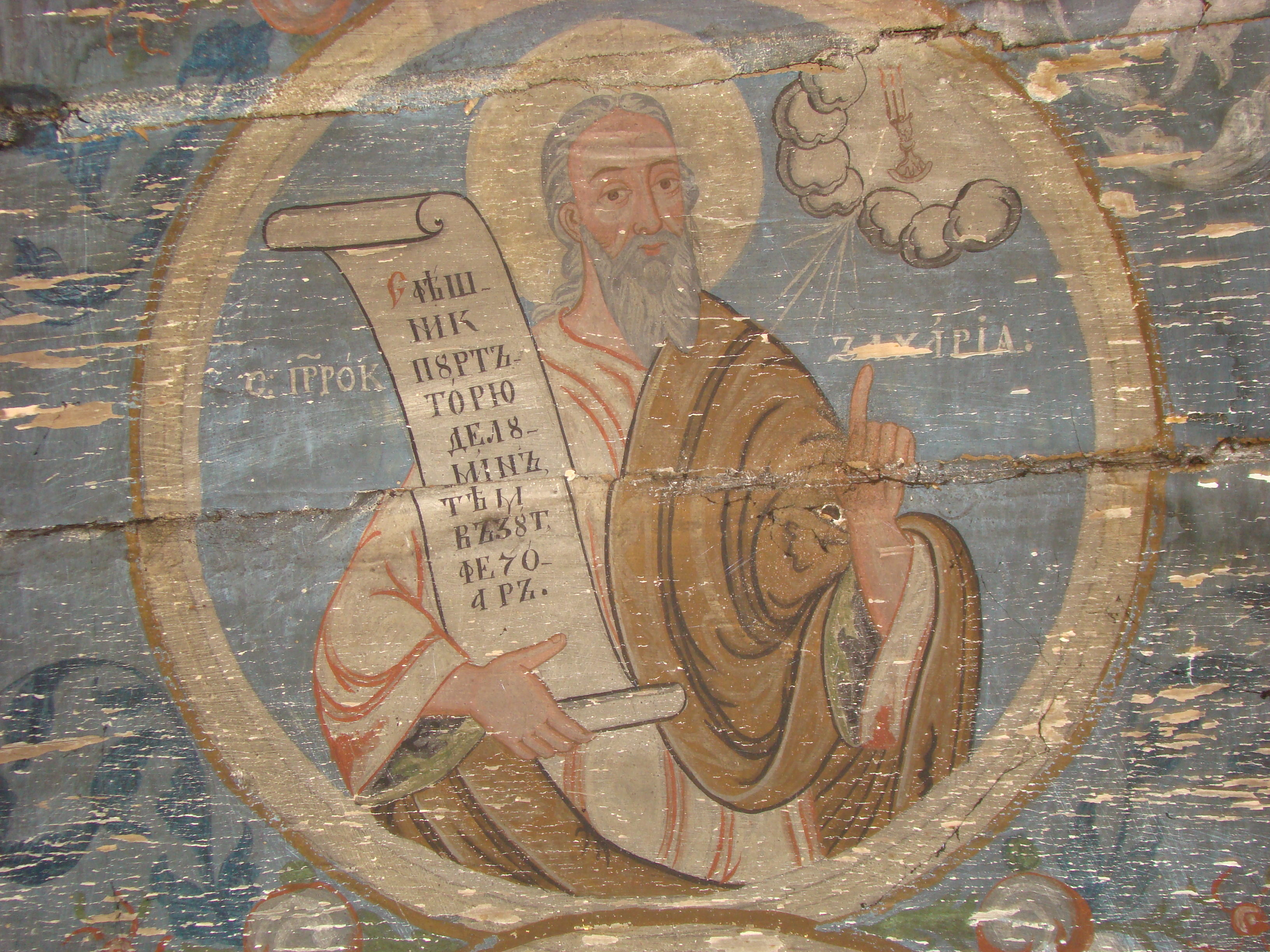 Biserica de lemn din Corbești-Arad